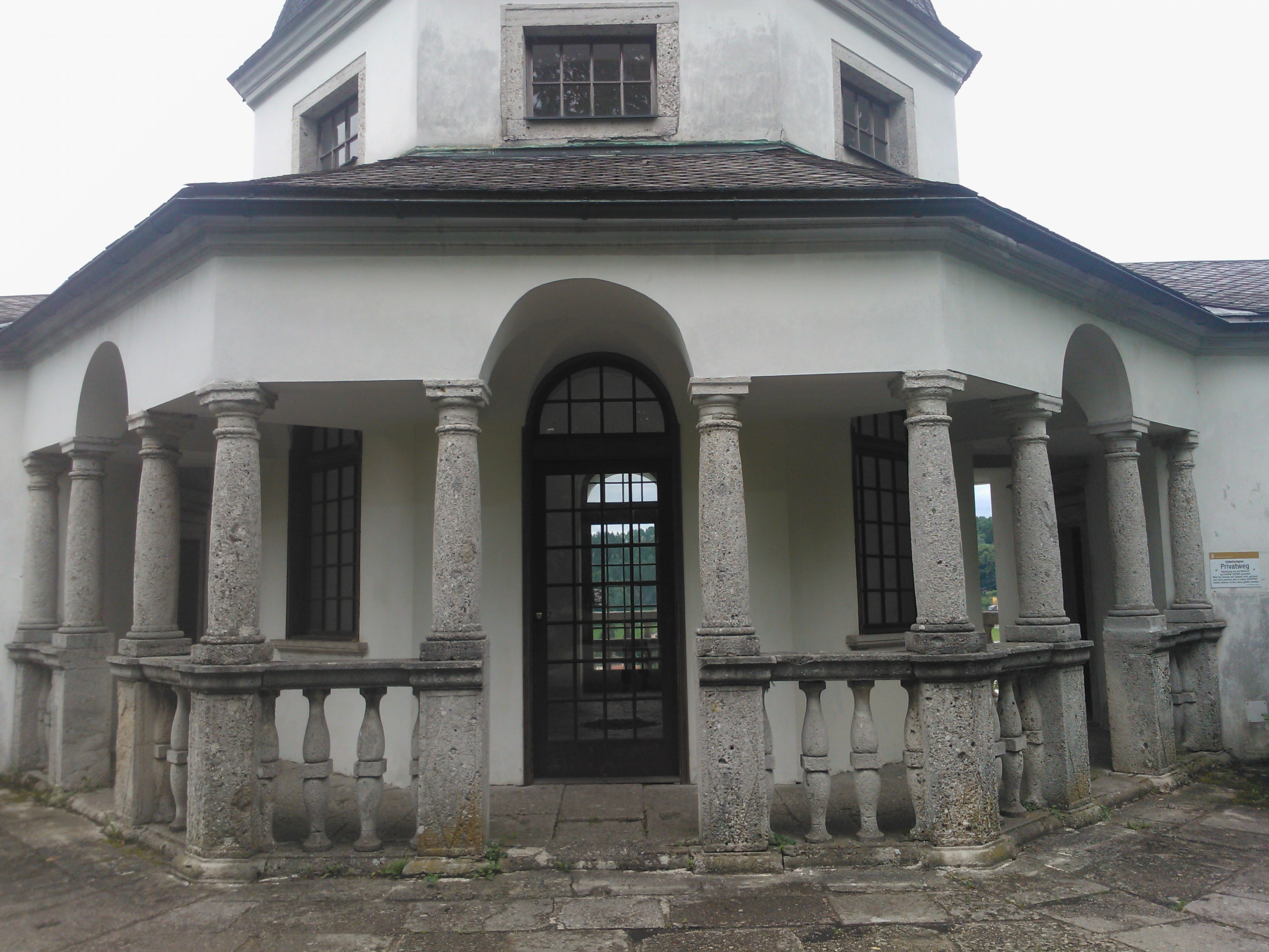 Gartenhaus im Klostergarten